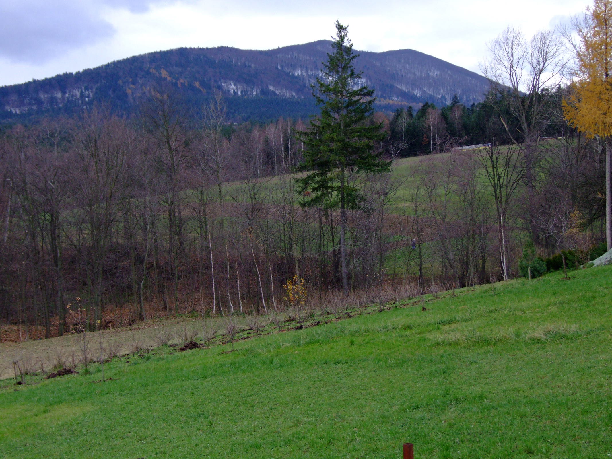 Śnieżnica - widok z Porąbki